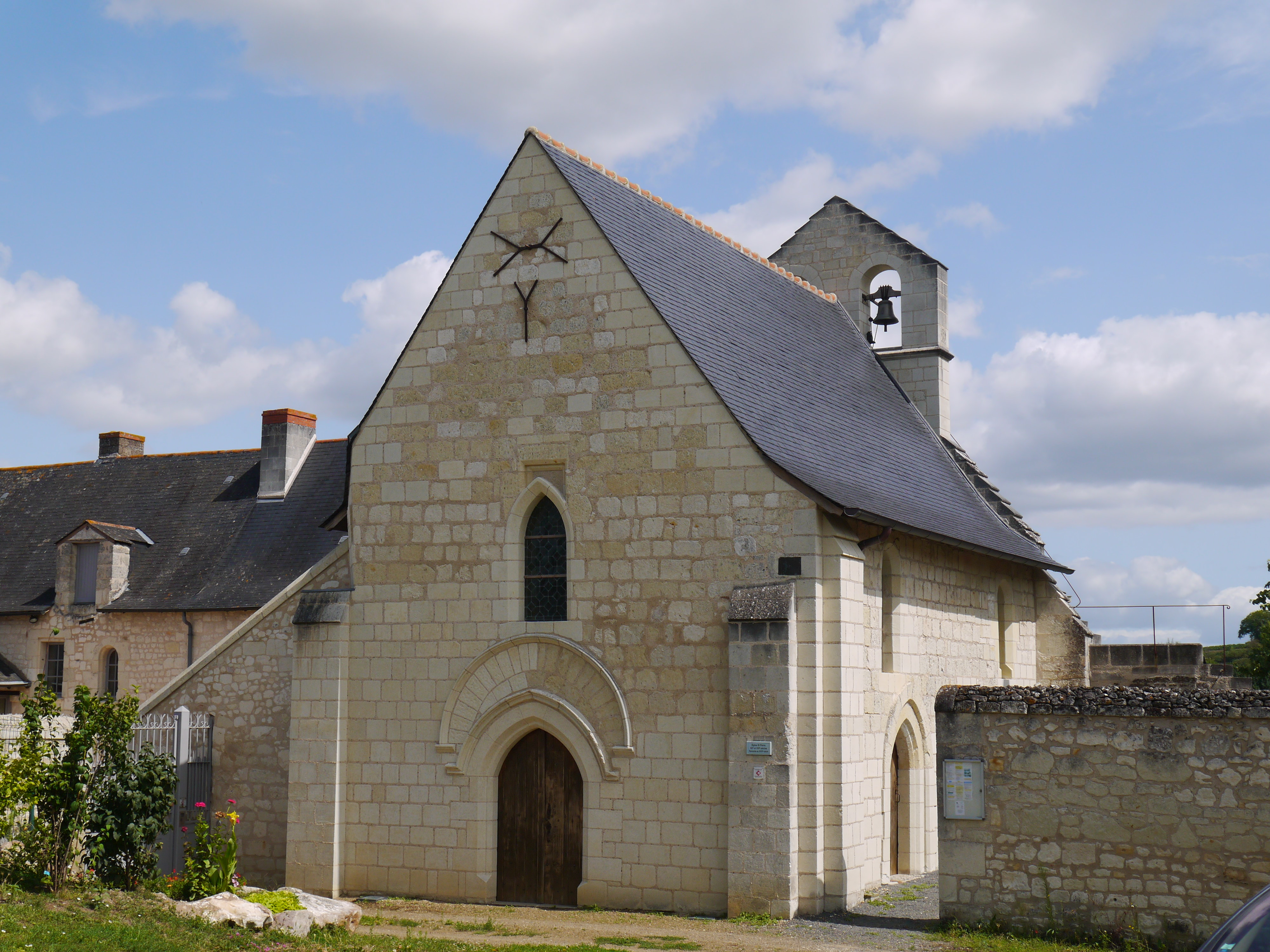 L'église Saint-Pierre.